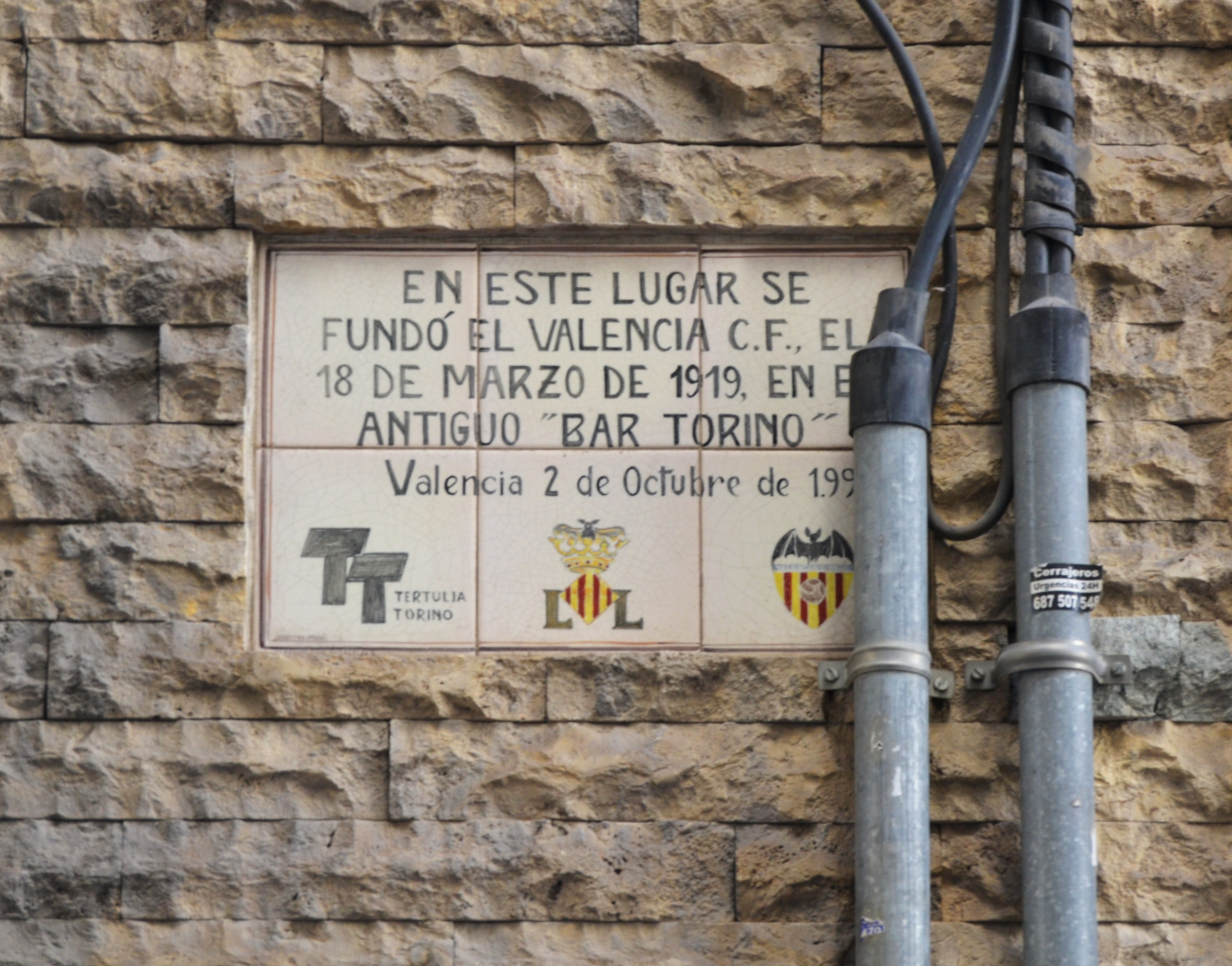 Placa al lloc on es va fundar el València C. F., carrer de la Barcelonina de València.